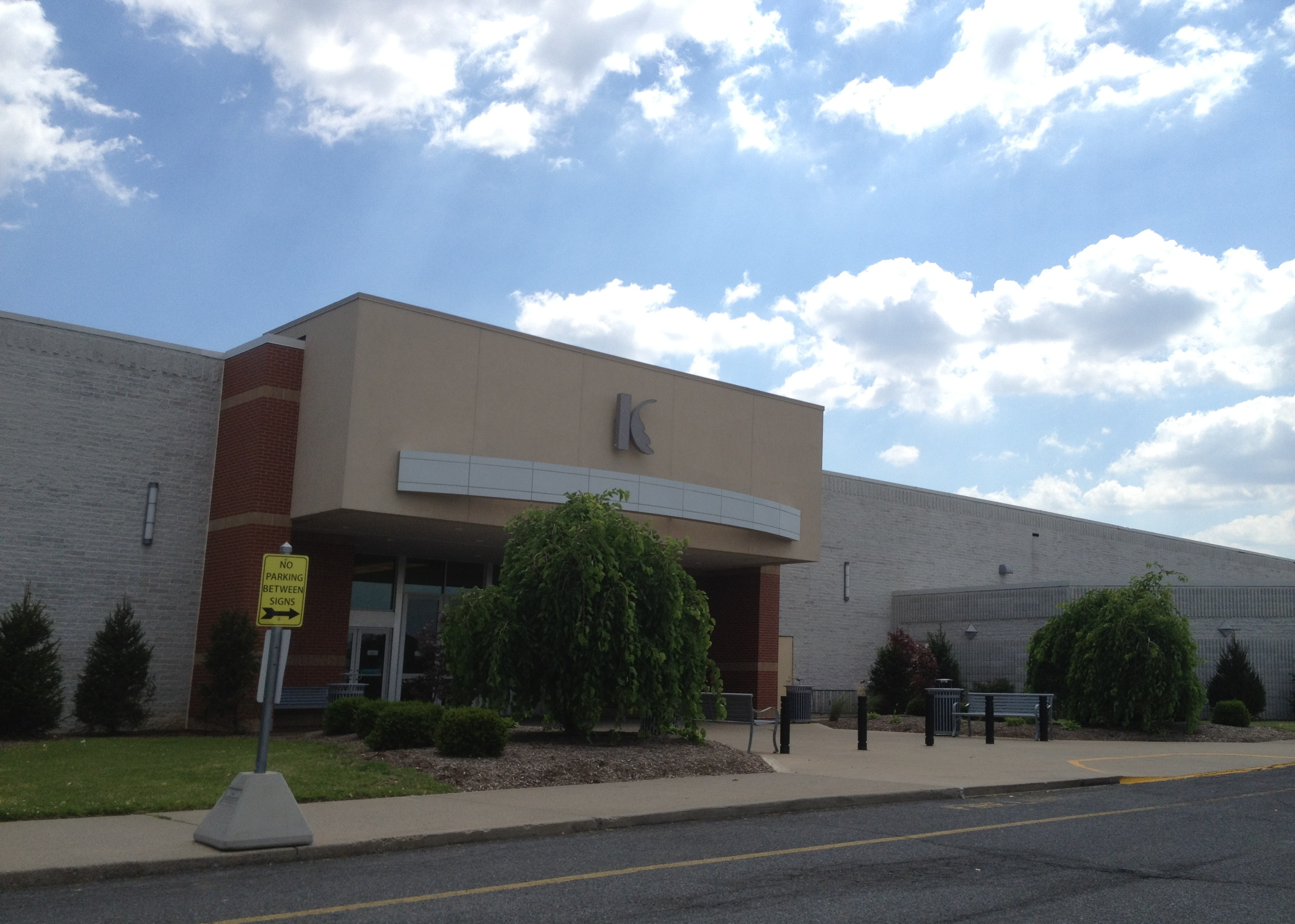 Kentucky Oaks Mall